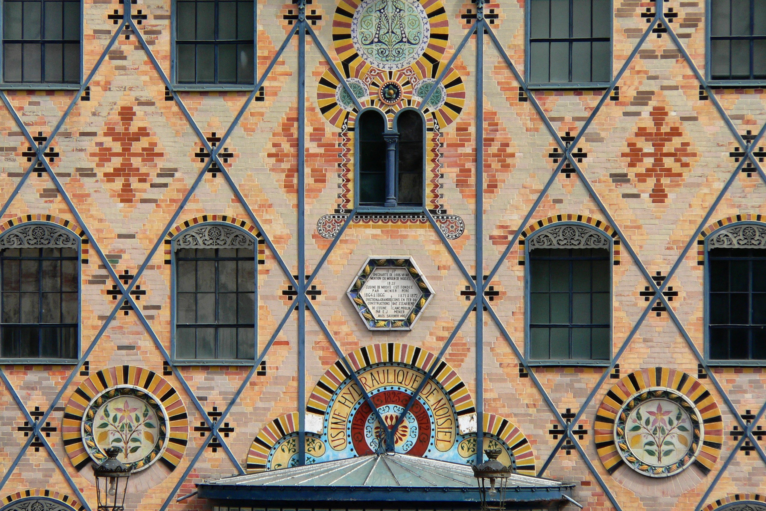 Détails de l'usine des Menier à Noisiel.